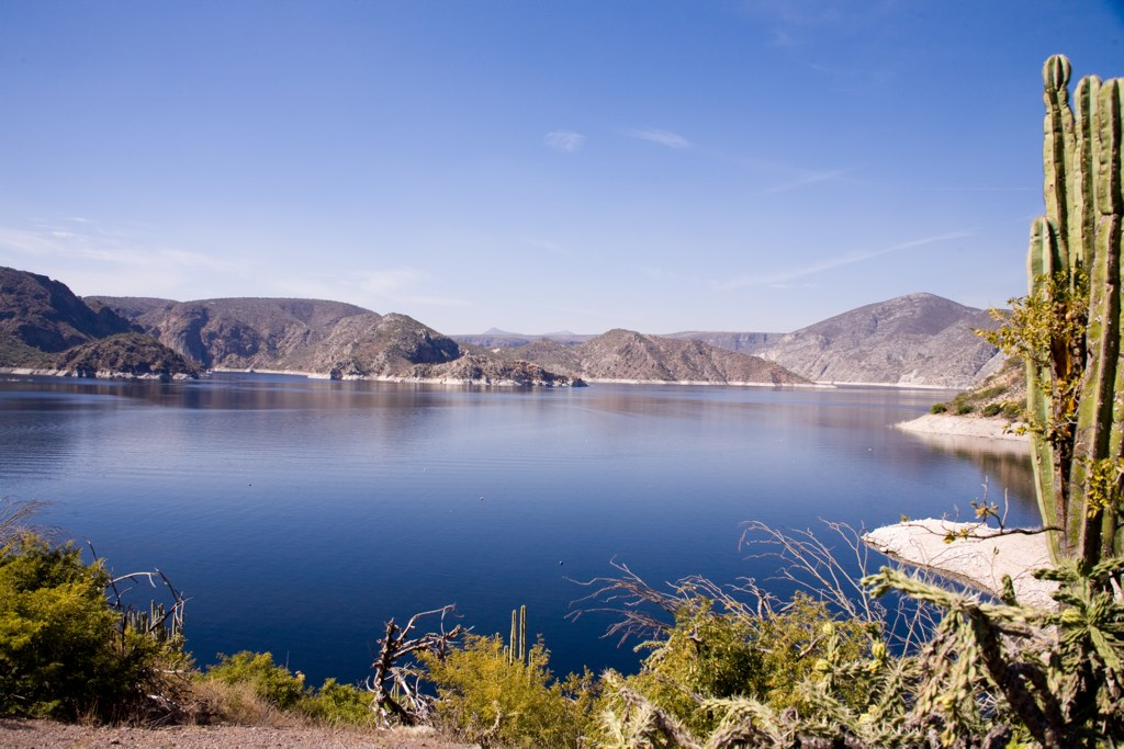 Zimapán-22